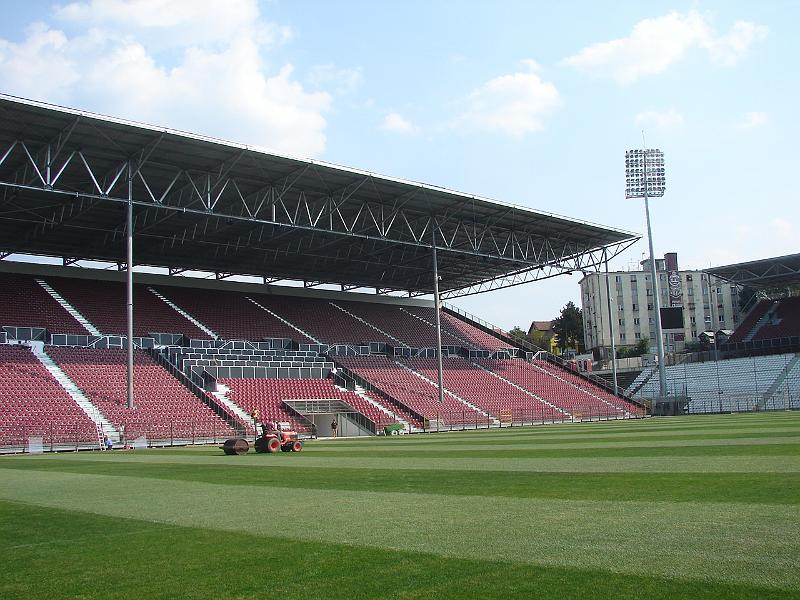 Dr. Constantin Rădulescu Stadion